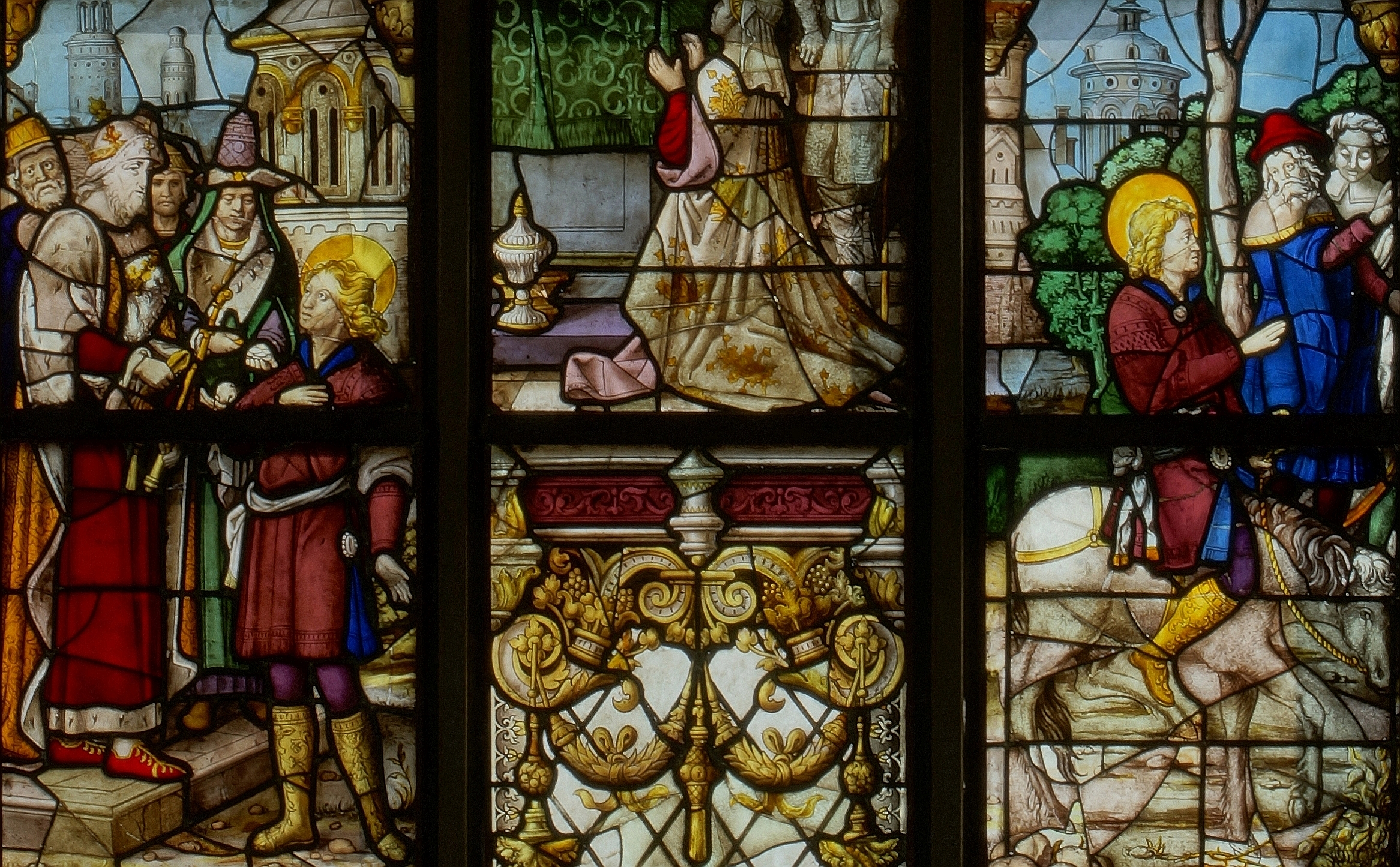 Sint-Leonarduskerk (Sint-Lenaarts). Detail van een glas-in-loodraam "Het leven van Sint-Leonardus" (anno 1535). Links ziet men Leonardus die van Clovis de machtiging ontvangt om gevangenen vrij te laten. Rechts ziet men Leonardus die vertrekt naar Aquitanië.